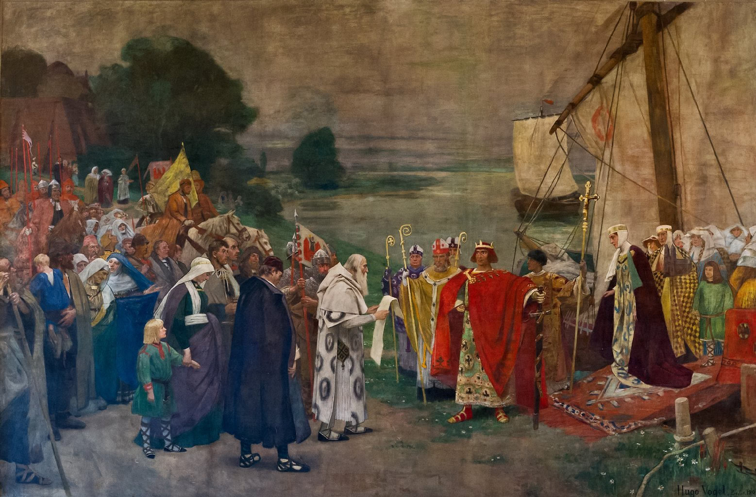 Hugo Vogel: Ankunft Ottos des Großen und seiner Gemahlin Edith bei Magdeburg anlässlich des Hoftags im September 937. Historiengemälde (1898) im Ständehaus der Provinz Sachsen in Merseburg (Info)